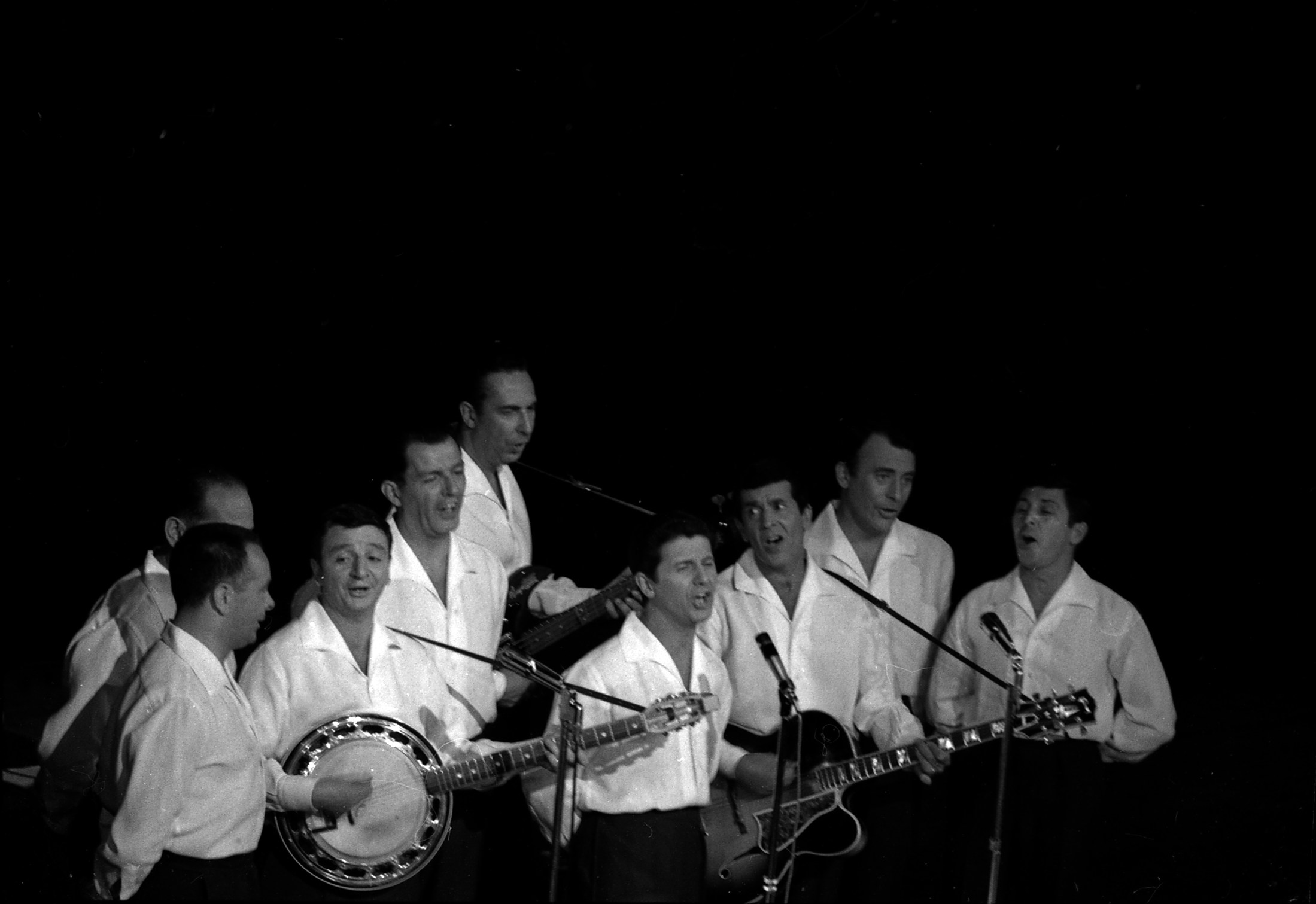 Théâtre du Capitole. Le 2 juin 1965. Plan d'ensemple sur scène du groupe "Les compagnons de la chanson", à l'occasion d'une soirée "Nuit de la Légion Etrangère" au théâtre du Capitole.